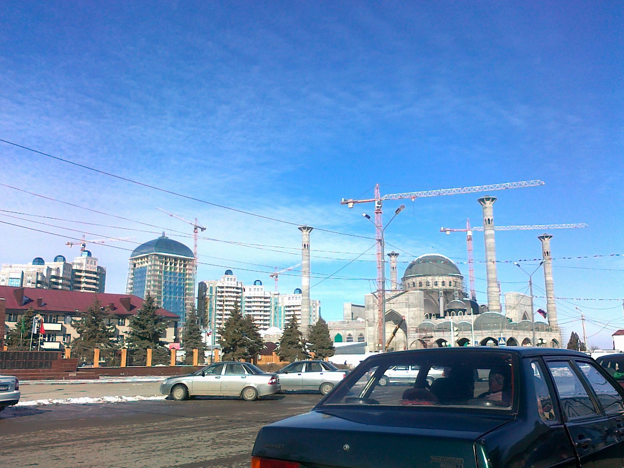 Шали. Строящийся комплекс высотных зданий и мечеть им. Р. Кадырова